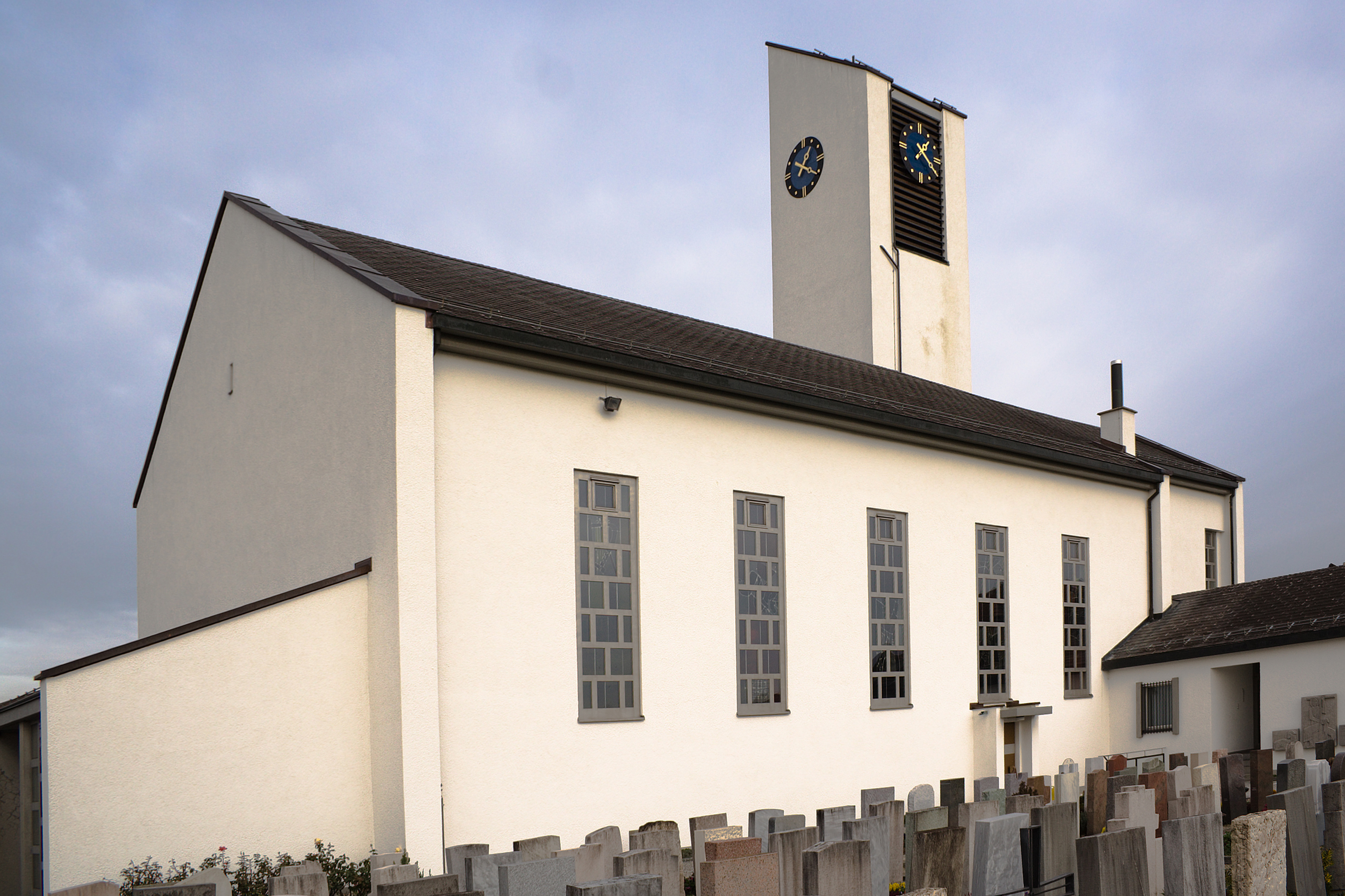 Lediglich eine geänderte, entzerrte Version von Muolen_Kirche.jpg Sonstiges: s.o.